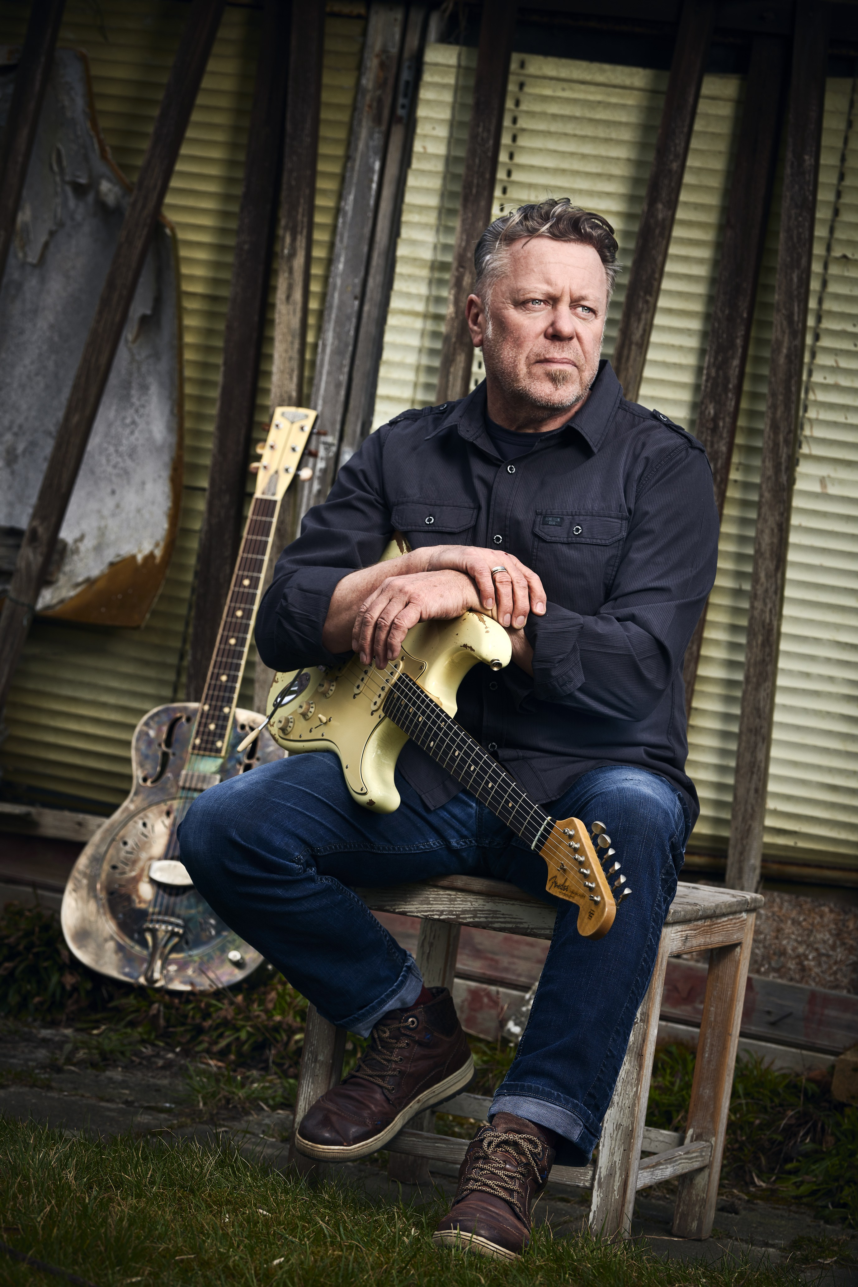 Richie Arndt Presse Download